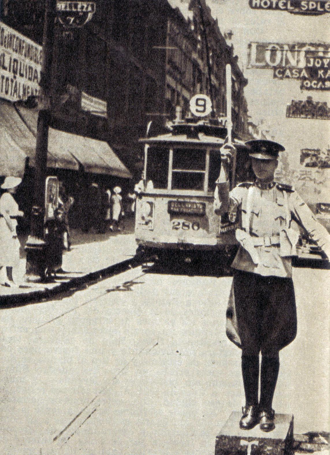 Carabinero de Tránsito en la calle Estado de Santiago de Chile. Al fondo, a la izquierda, el edificio de tienda de departamentos Gath & Chaves.